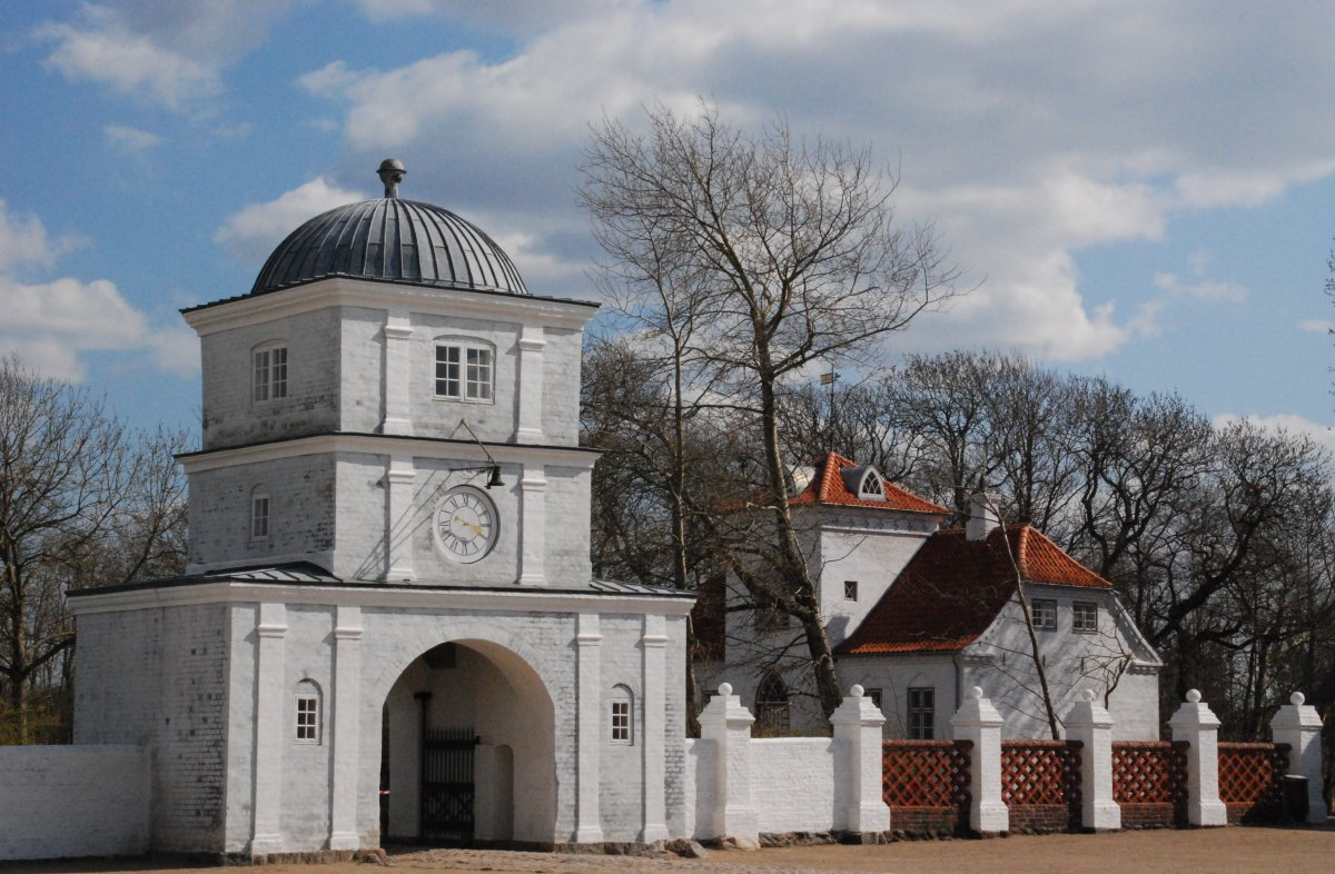 Nørre Vosborg, Manor house in Denmark